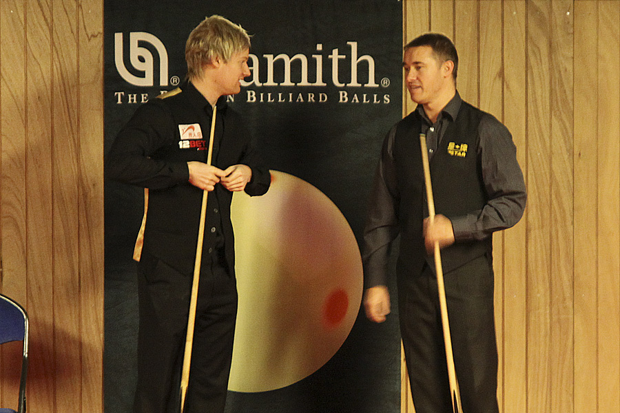 EPTC 2